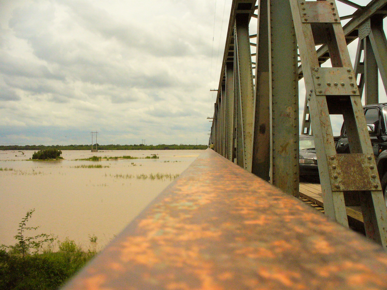 El puente sobre el rio grande es para el tren. Se utilizaba también para transporte de vehículos antes de terminar un nuevo puente para el tráfico rodado. Esta es la salida hacia el Brasil.